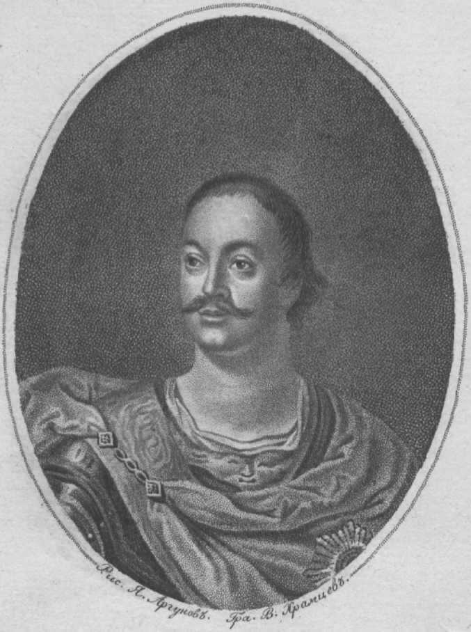 Иван Иванович Бутурлин (24 июля 1661 — 31 декабря 1738) — российский генерал, сын ближнего стольника, внук Андрея Васильевича Кривого, окольничего при царе Алексее. Данное изображение также было использовано в статье «Бутурлин, Иван Иванович» опубликованной в пятом томе «Военной энциклопедии», который был издан книгоиздательским товариществом Ивана Дмитриевича Сытина в 1911 году в столице Российской империи городе Санкт-Петербурге.